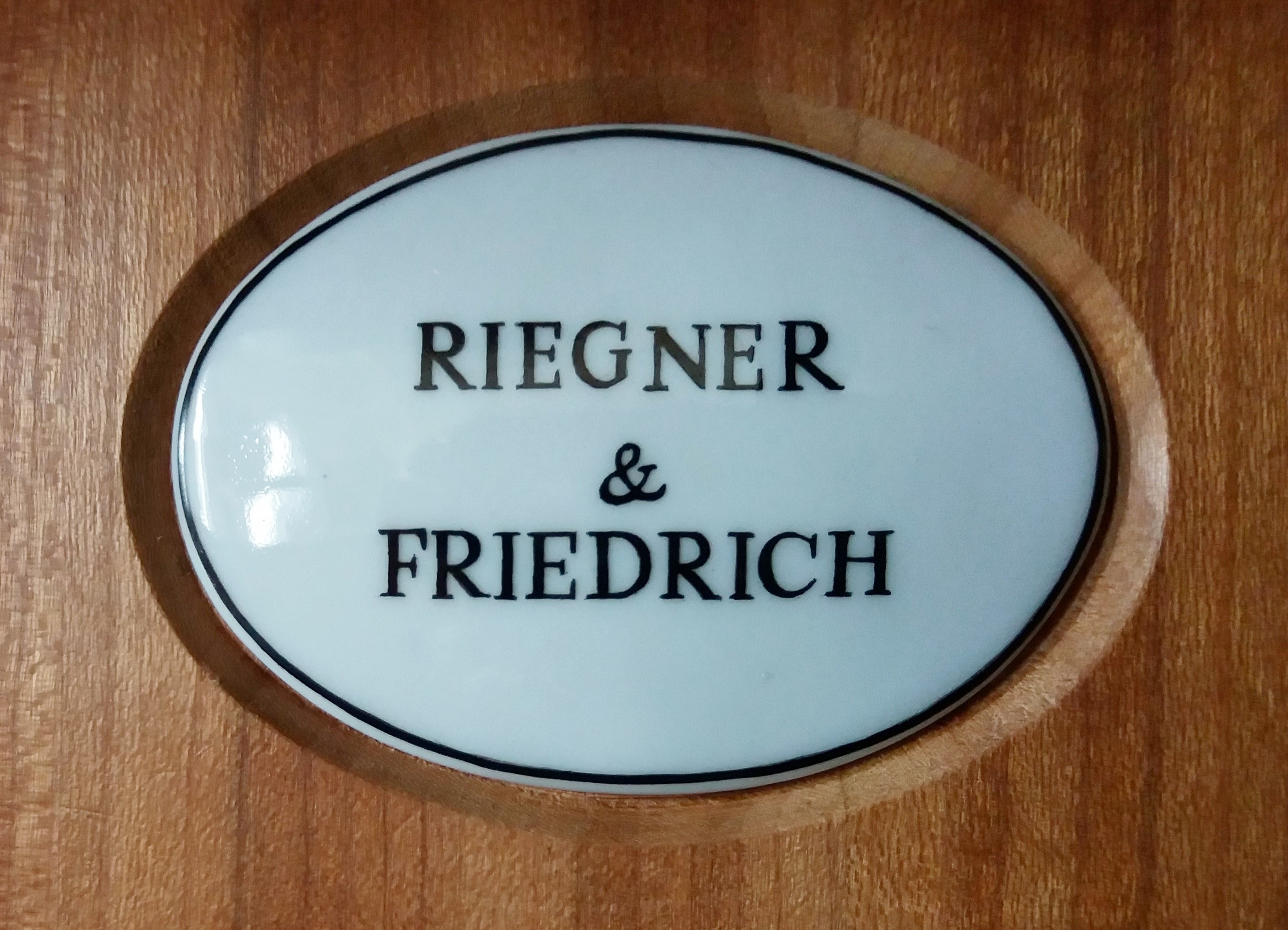 Orgel von Riegner & Friedrich (1995) in der katholischen Pfarrkirche St. Valentin in Buch (Schwaben), Landkreis Neu-Ulm; Firmenschild